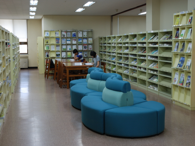 창원대학교 중앙도서관 연속간행물실의 열람실 내부입니다.